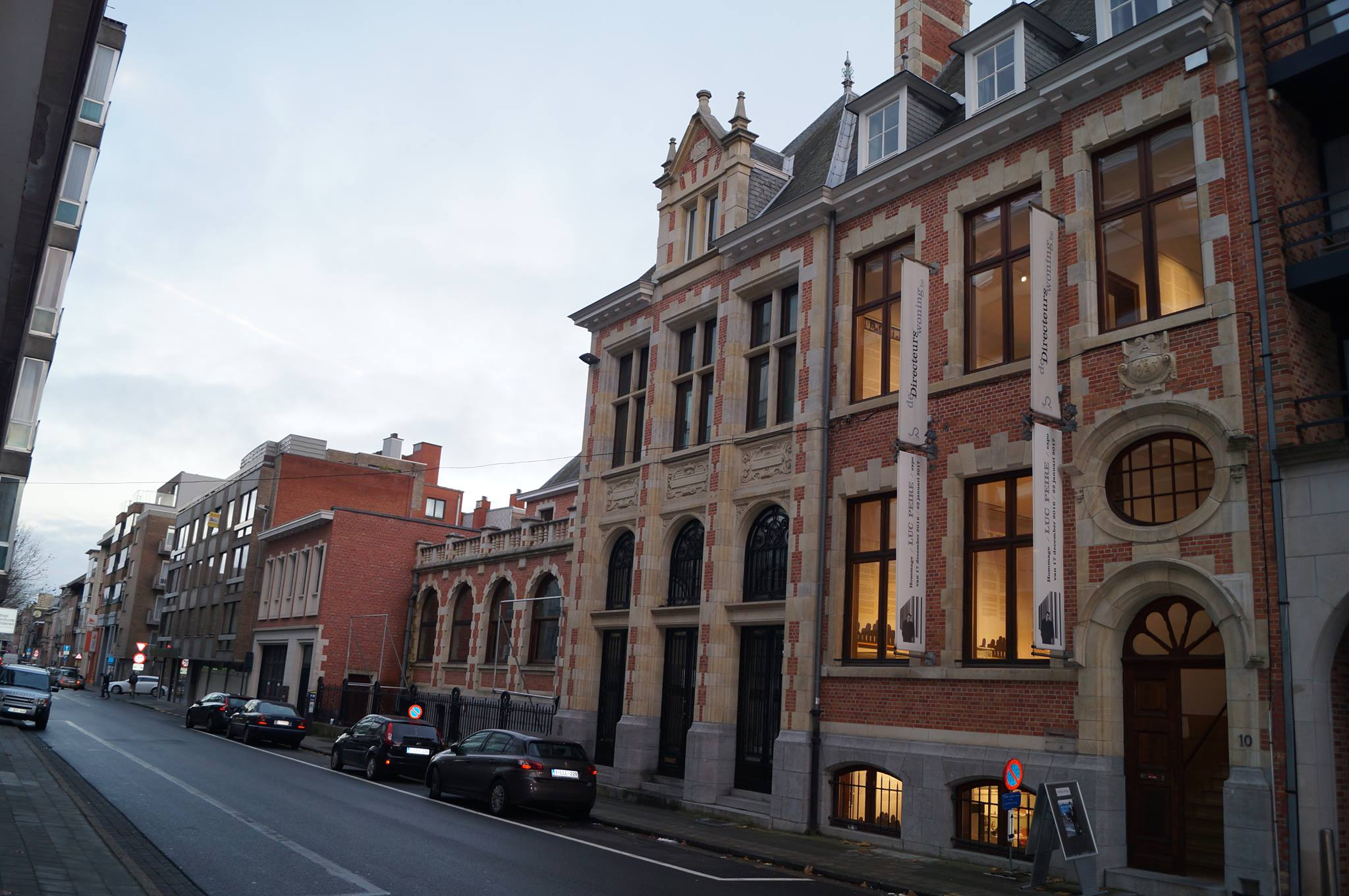 de hedendaagse directeurswoning te Roeselare